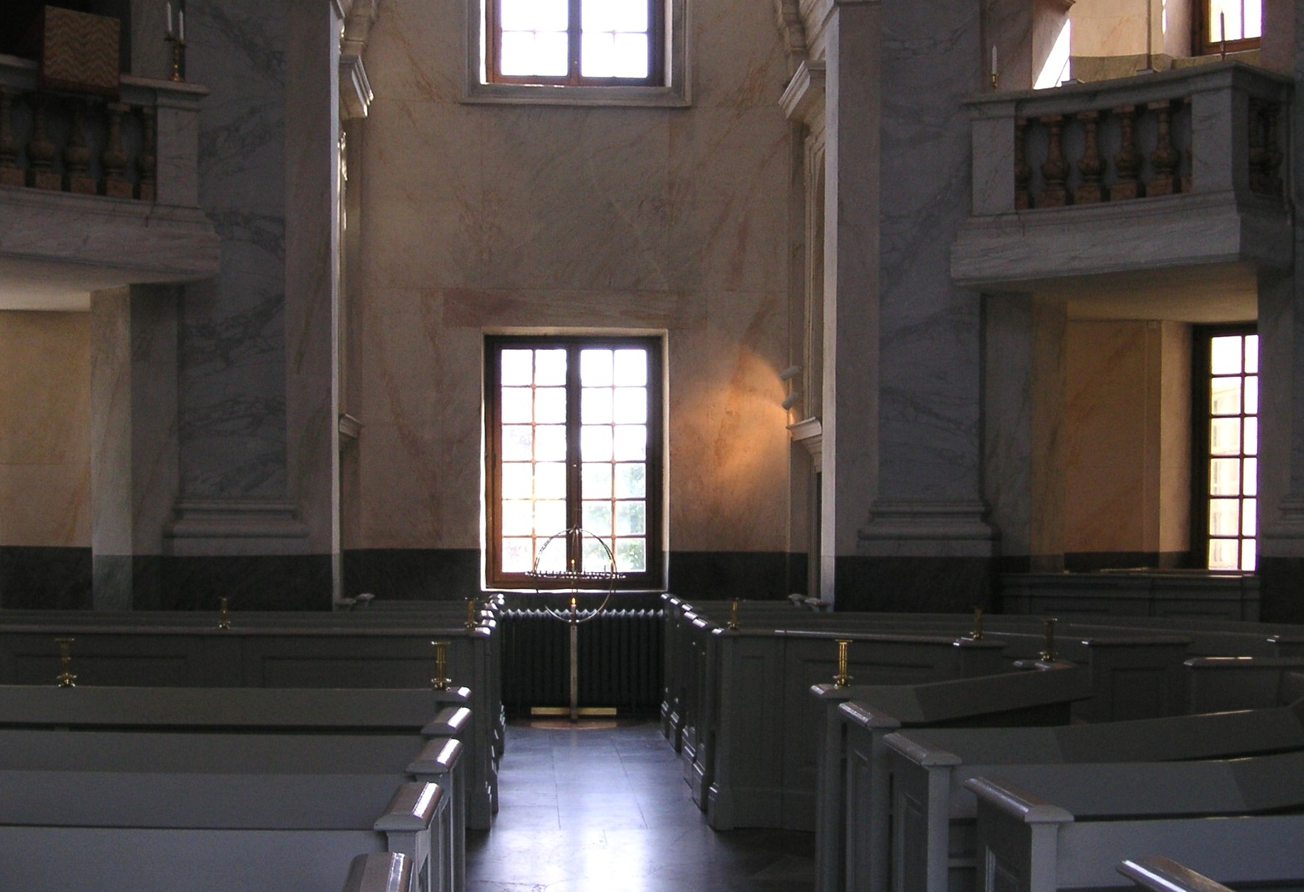 Drottningholms slottskyrka mittgången